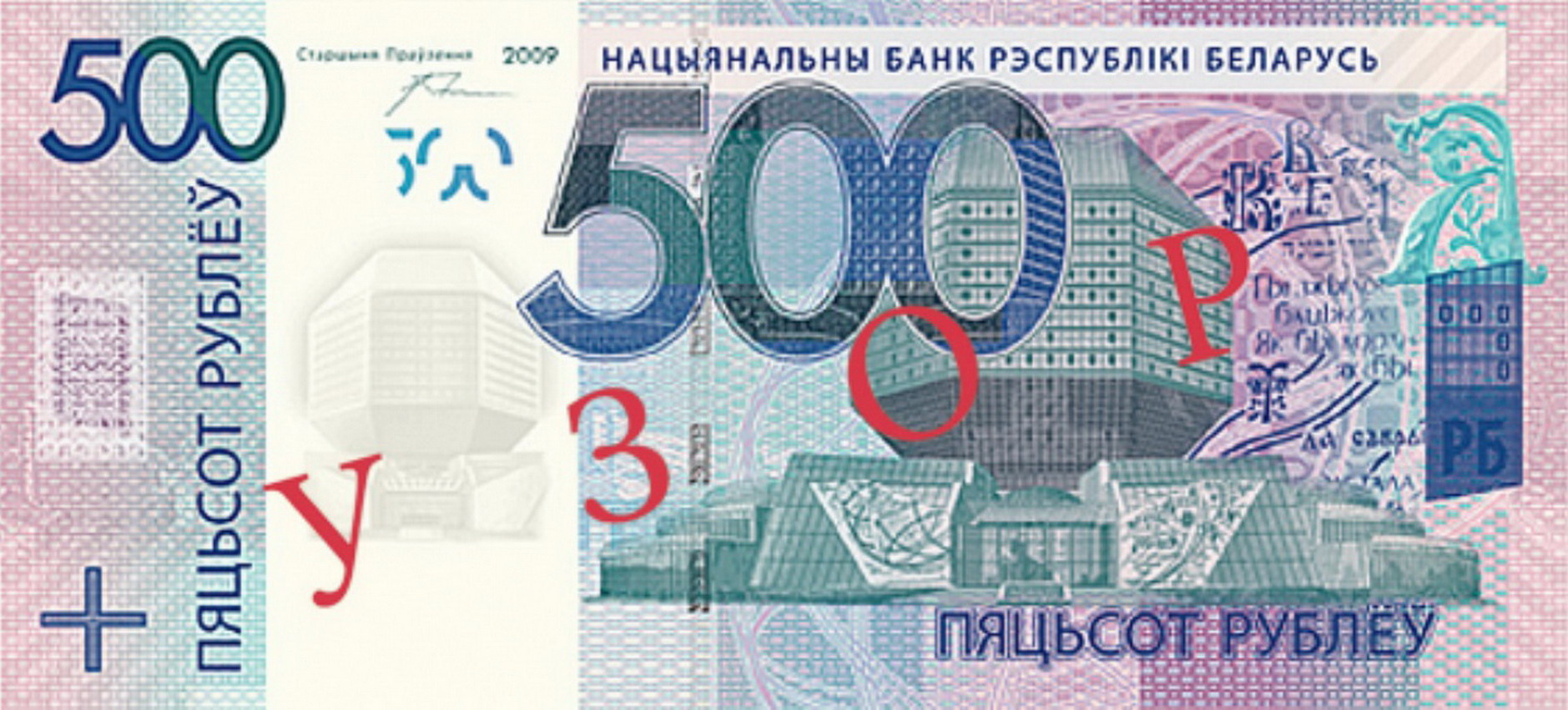 Купюра 500р